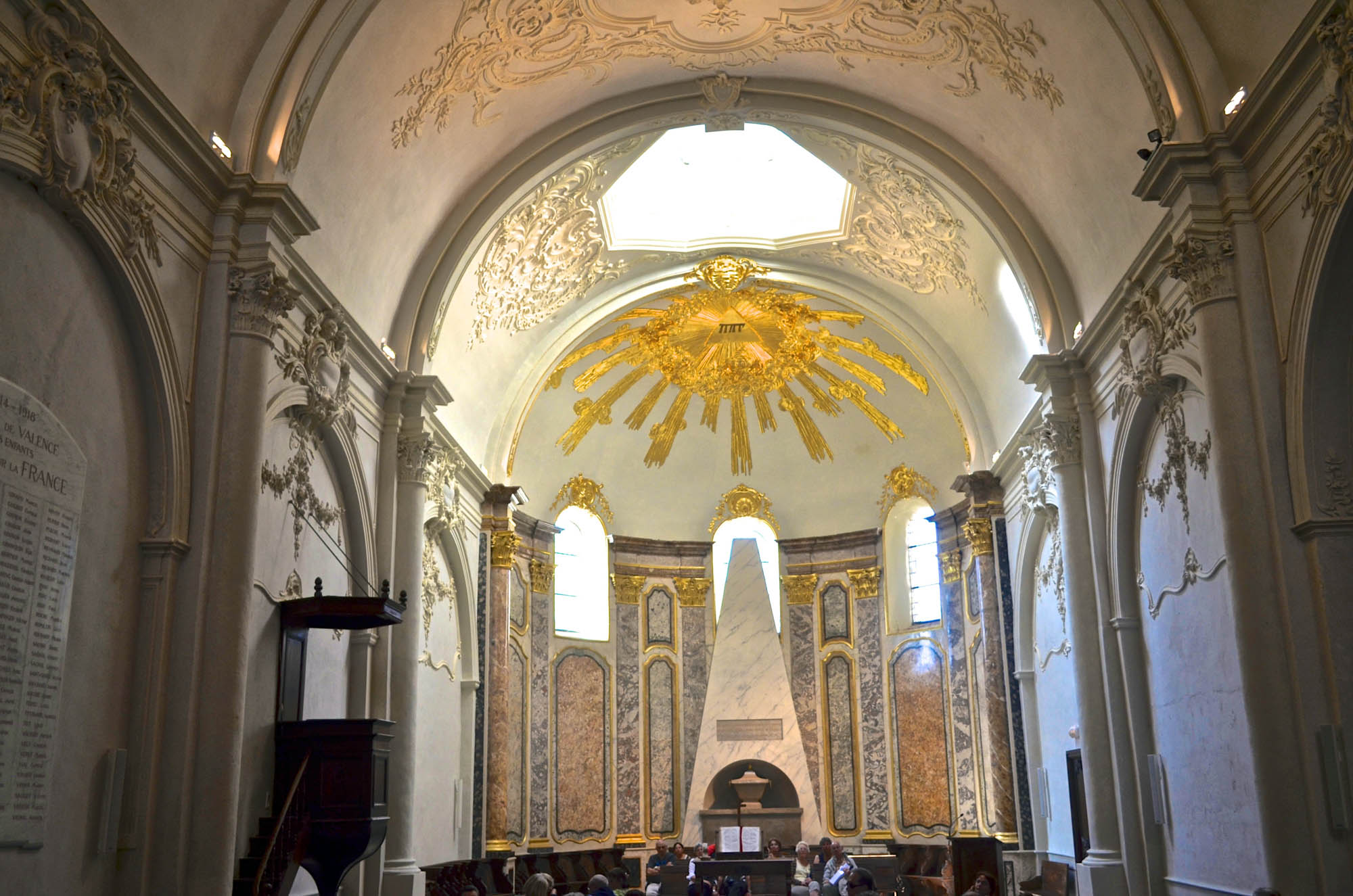 Ancienne église Saint-James, ancien prieuré Saint-Ruf, aujourd'hui temple protestant à Valence (Drôme, France) : nef et chœur.